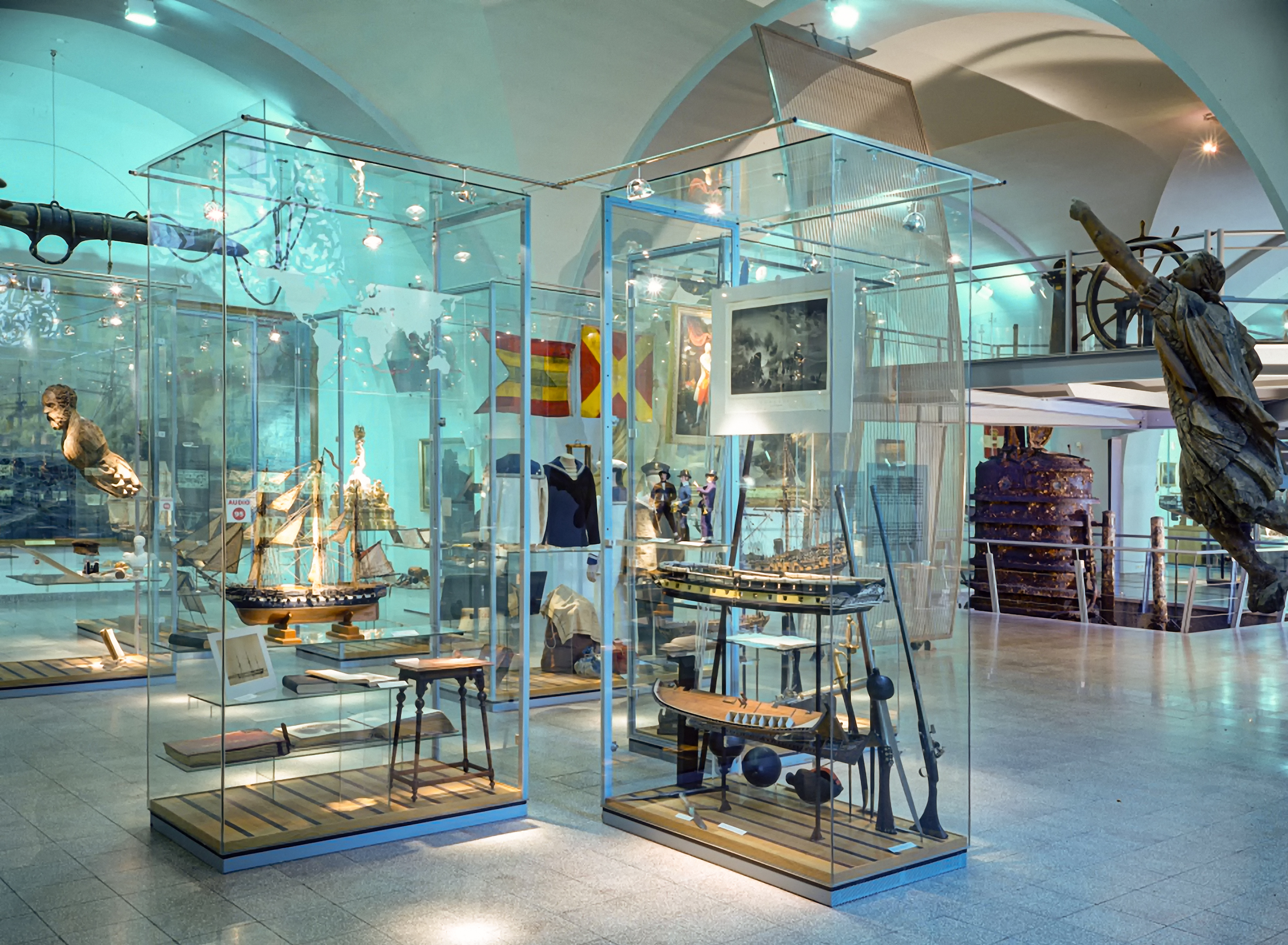 Einblick in den Saal VIII (Marinesaal) des Heeresgeschichtlichen Museums in Wien